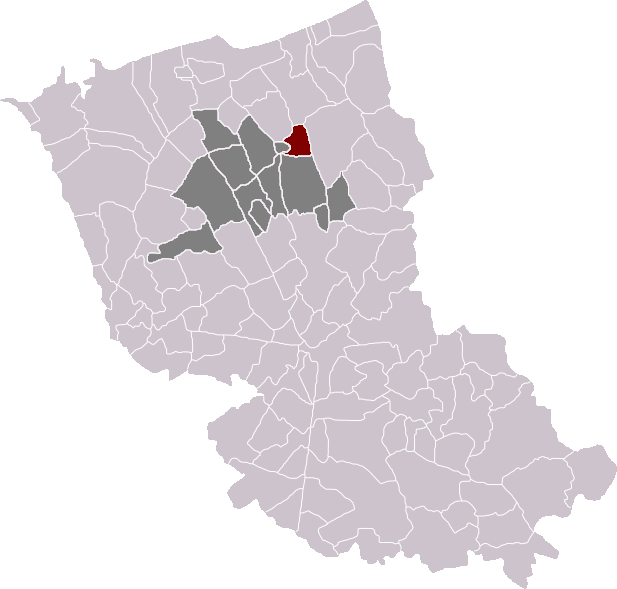 Locatie gemeente Hooimille in arrondissement Duinkerke. Zelfgemaakt. Location of Hoymille municipality in the arrondissement of Dunkirk. Self made. Localisation de la commune d'Hoymille dans l'arrondissement de Dunkerque. Fait moi-même.